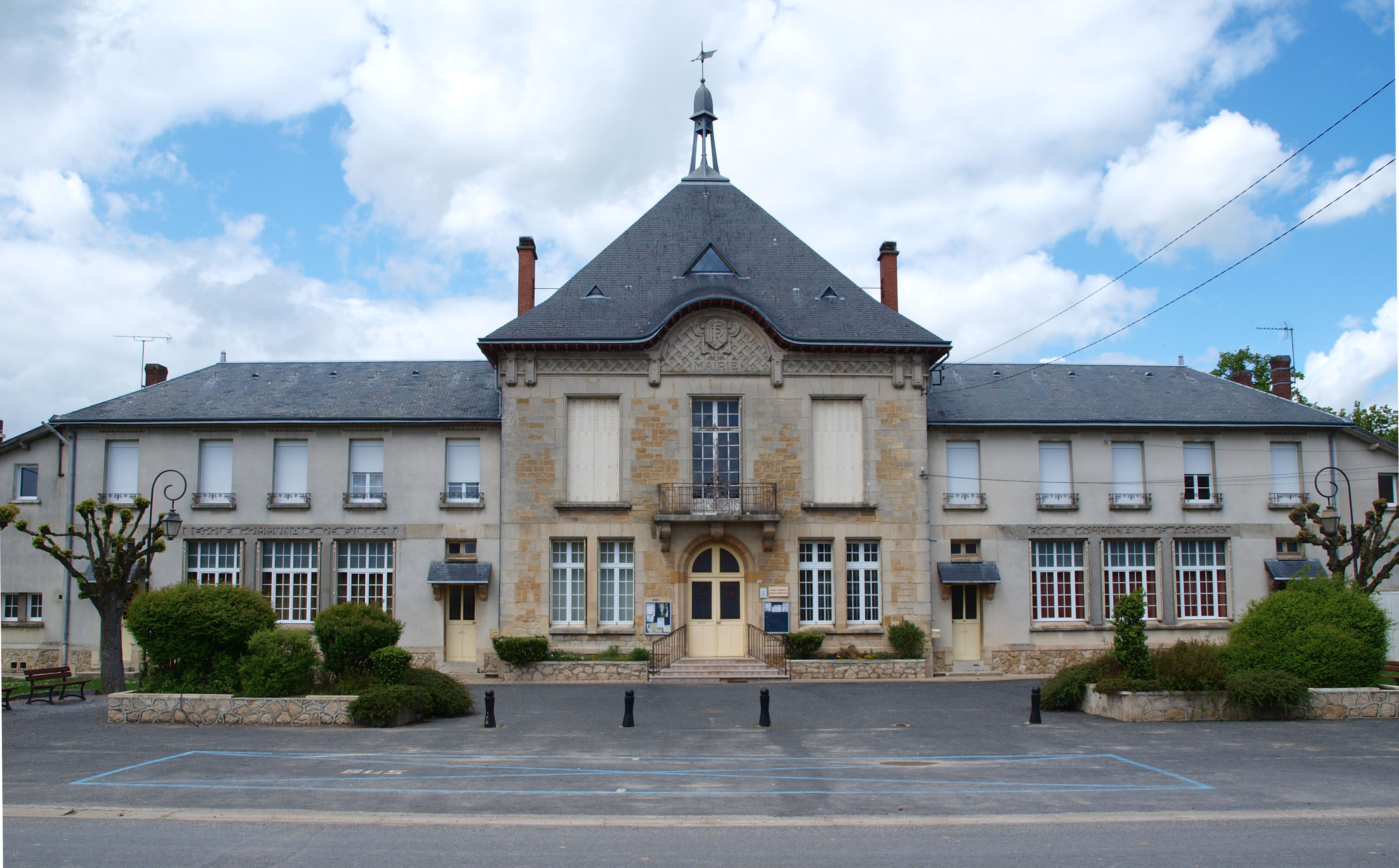 Sommepy-Tahure (Marne, France) ; la mairie-école.